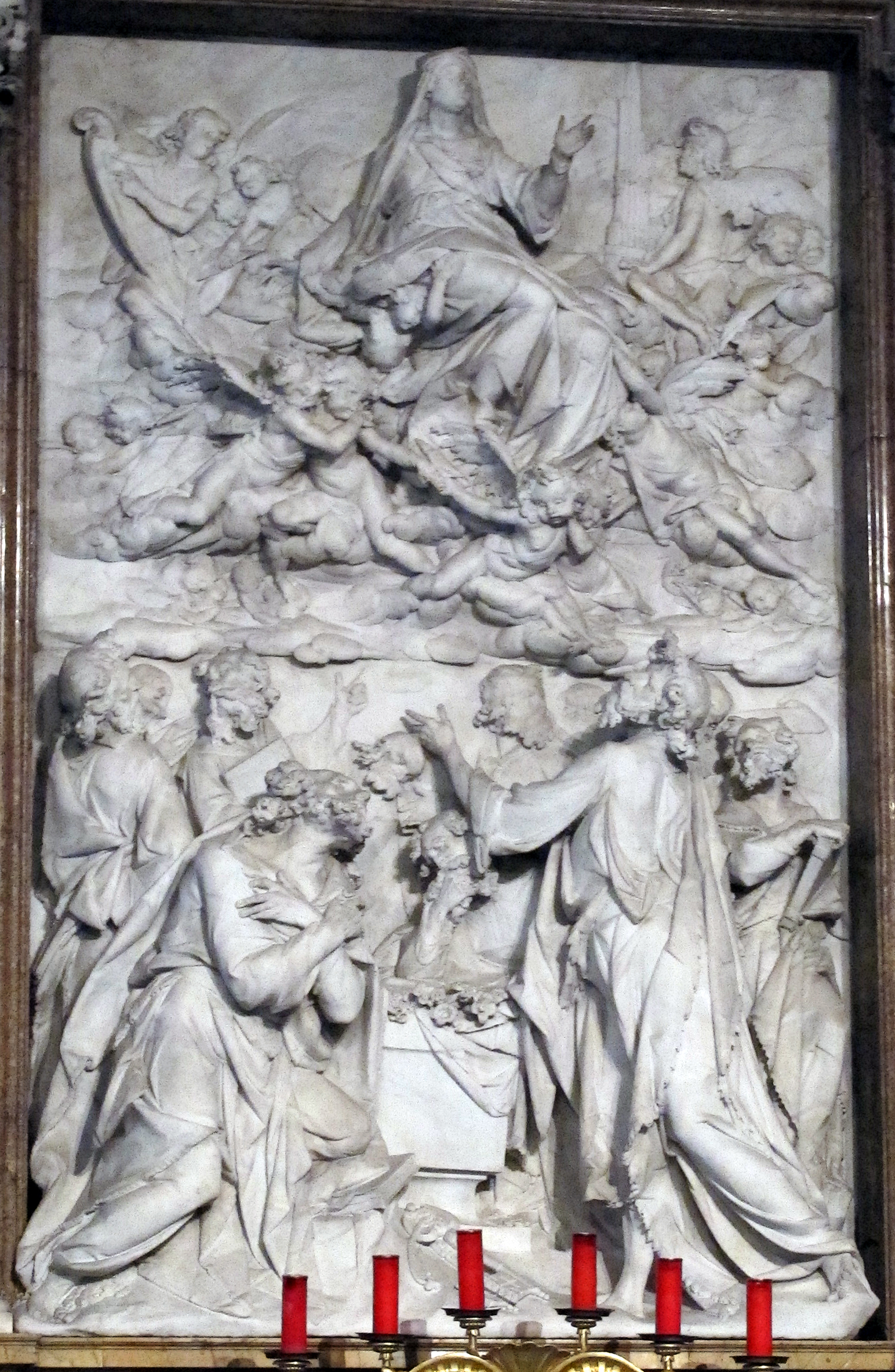 Santa Maria Maggiore (Roma)